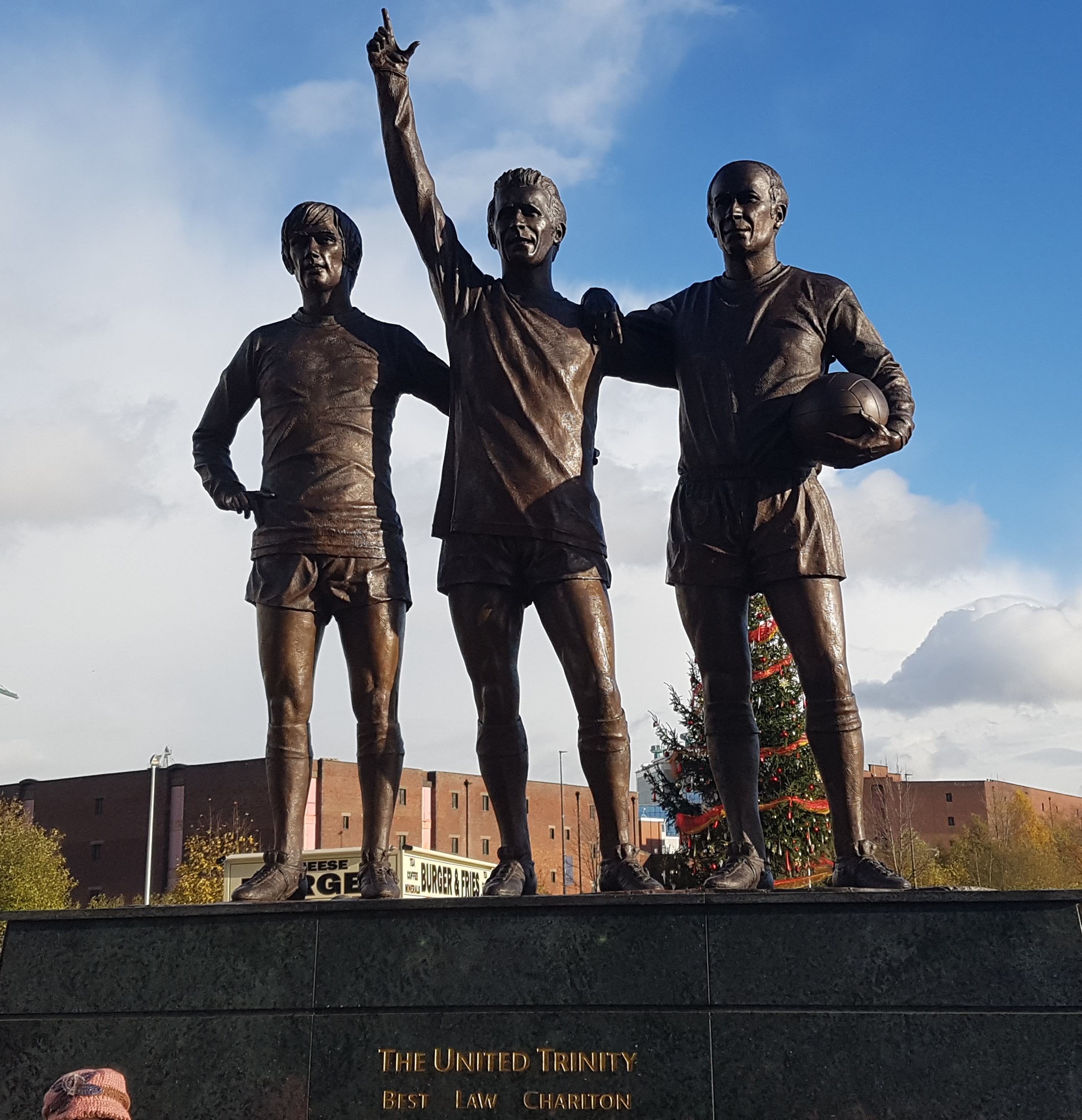 Statue der "United Trinity" am Old Trafford. George Best, Denis Law und Bobby Charlton.